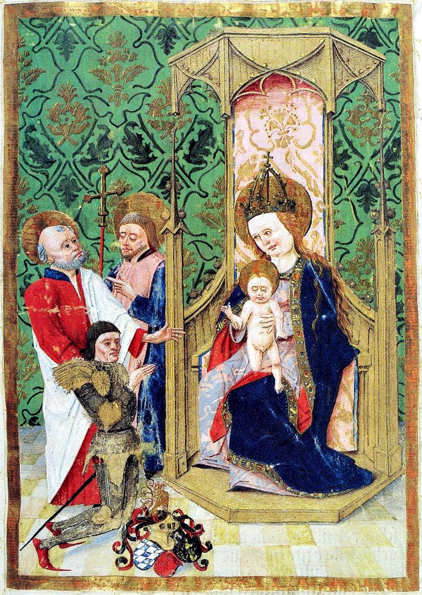 Kurfürst Friedrich I. von der Pfalz, knieend vor Madonna mit Jesuskind